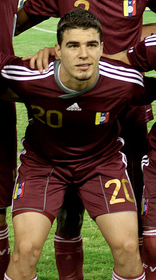 Vinotintos